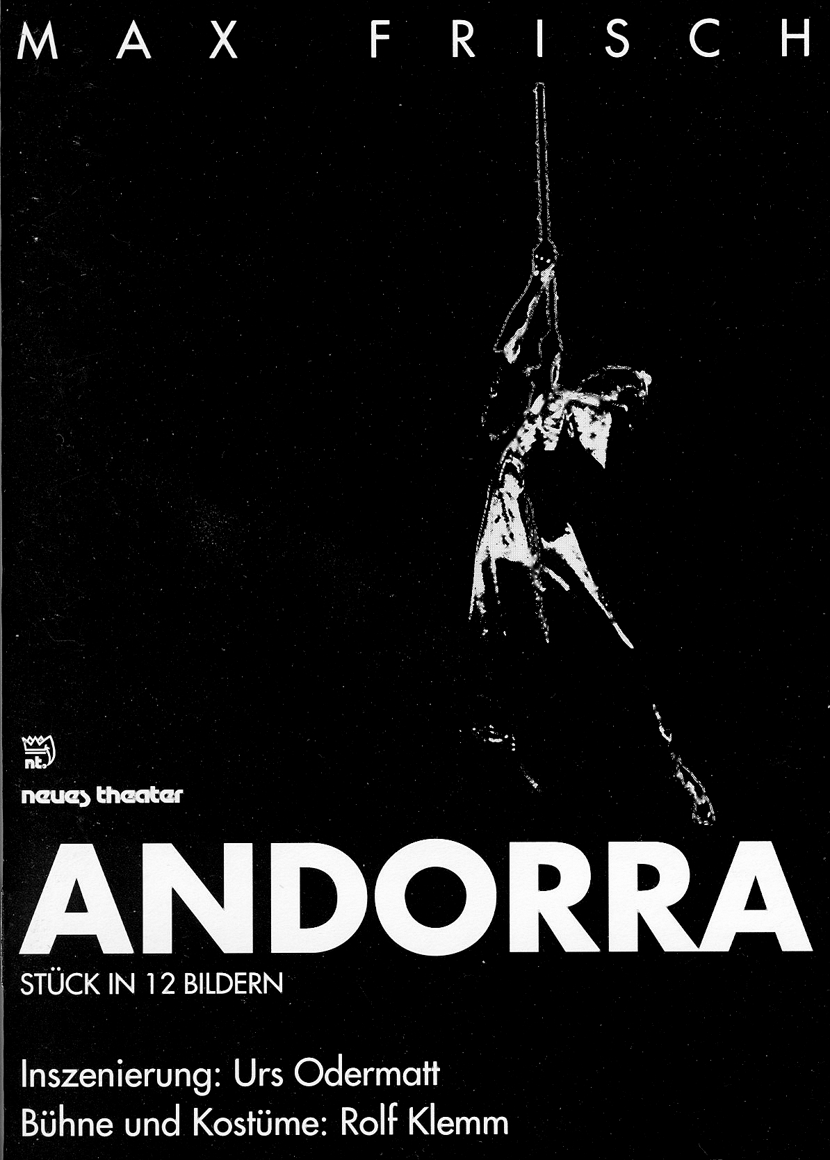 Theaterinszenierung von Urs Odermatt, Andorra von Max Frisch, Neues Theater in Halle